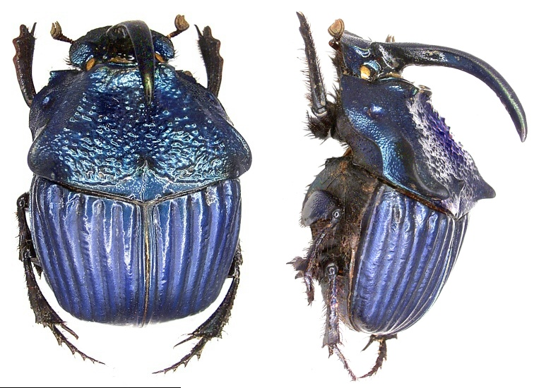 Familie: Scarabeidae Grösse: 15-26 mm Verbreitung: Guatemala Fundort: Guatemala, Chimaltenago leg. 1978; det. U.Schmidt Foto: U.Schmidt, 2006